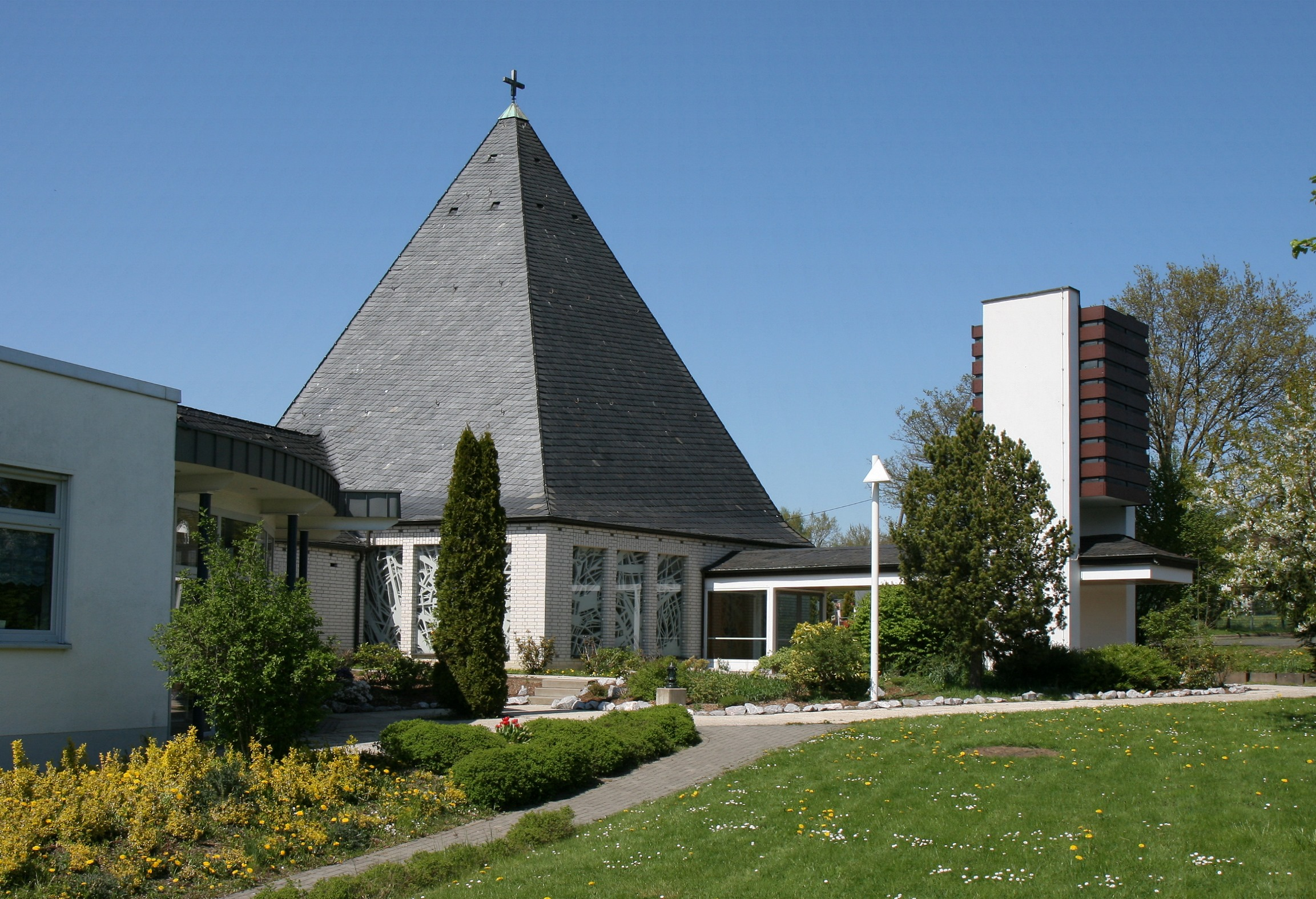 Evangelische „Kreuzkirche Landhausen“ in Hemer-Landhausen.